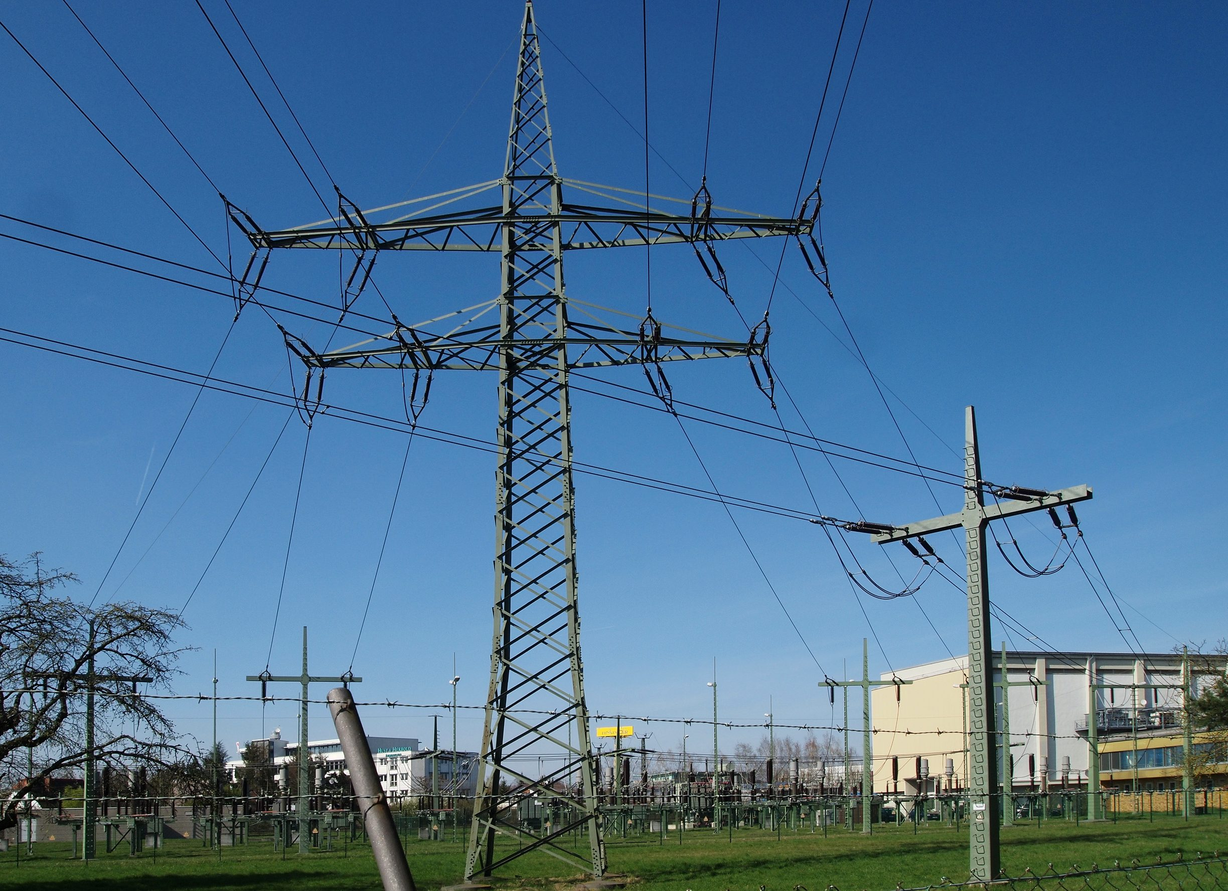 Abspannmasten der Bahnstromleitungen am Umformerwerk Karlsruhe